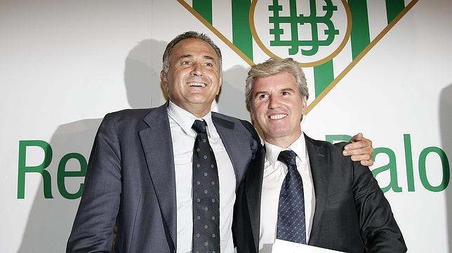 Rafael Gordillo y Miguel Guillén.